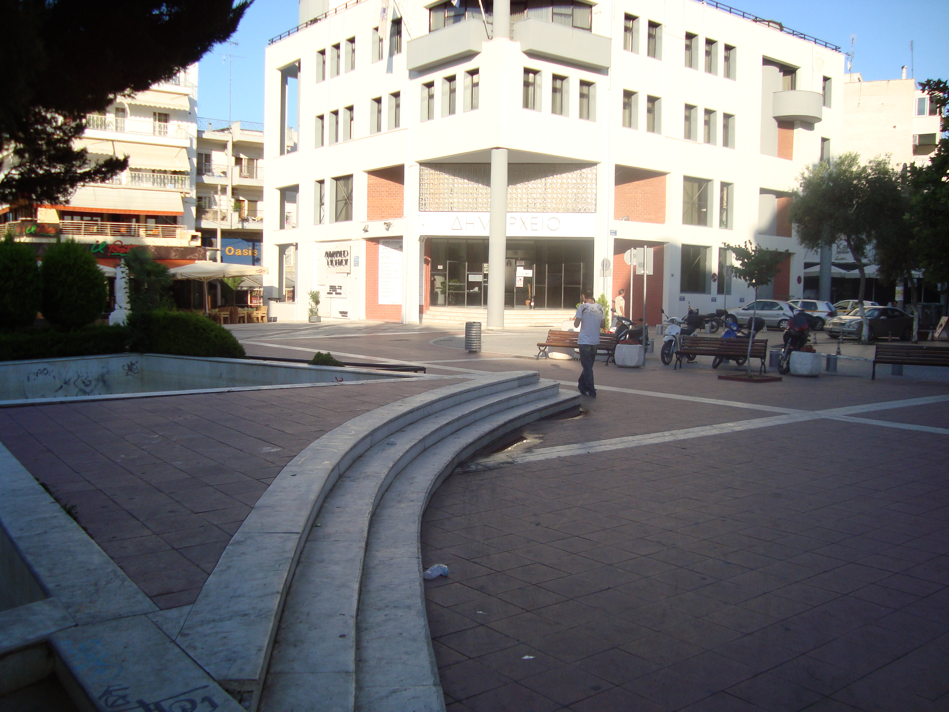 πλατεία Ευόσμου